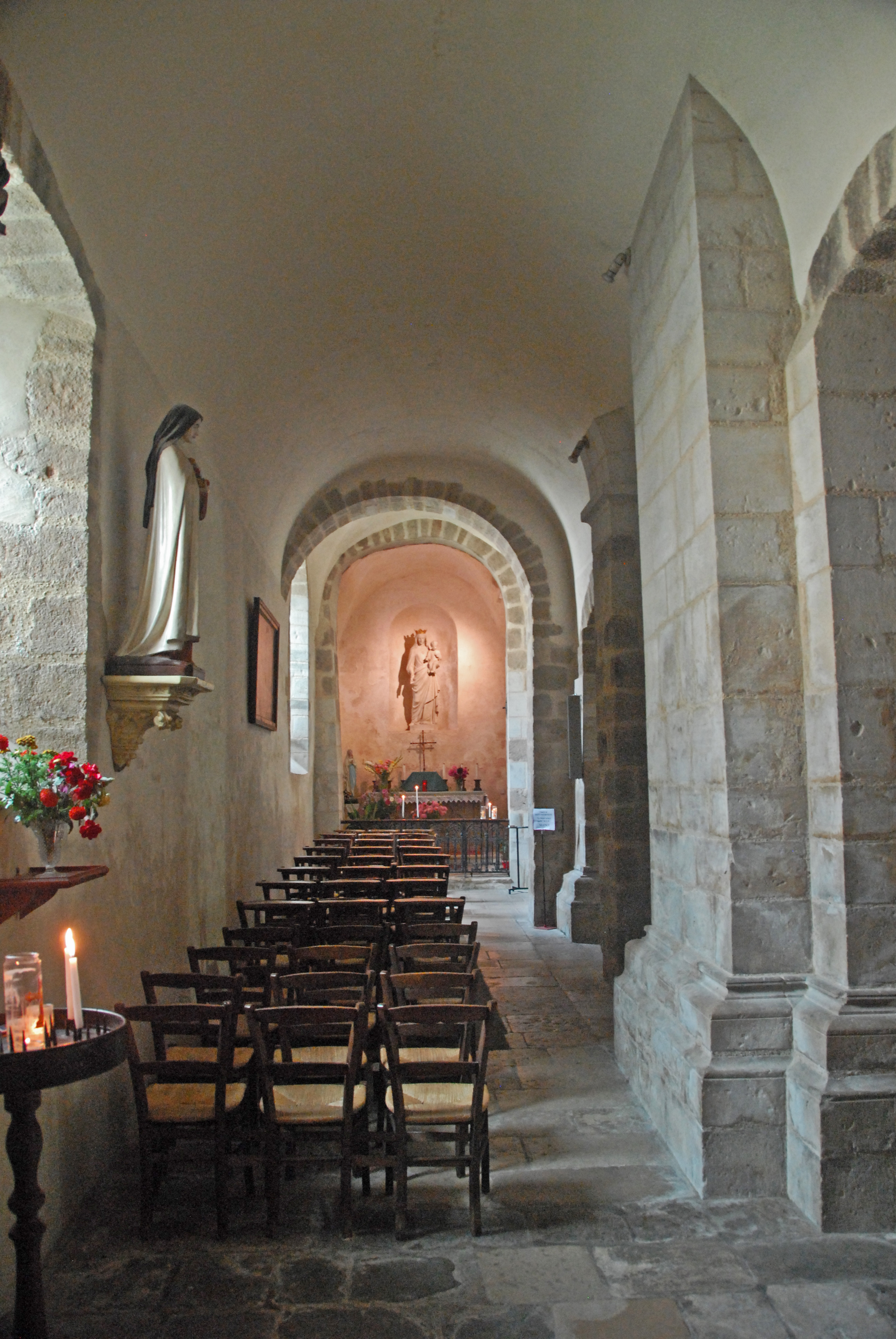 Neuvy_St.-Sépulcre, Basilika, nordöstl. Seitenschiff